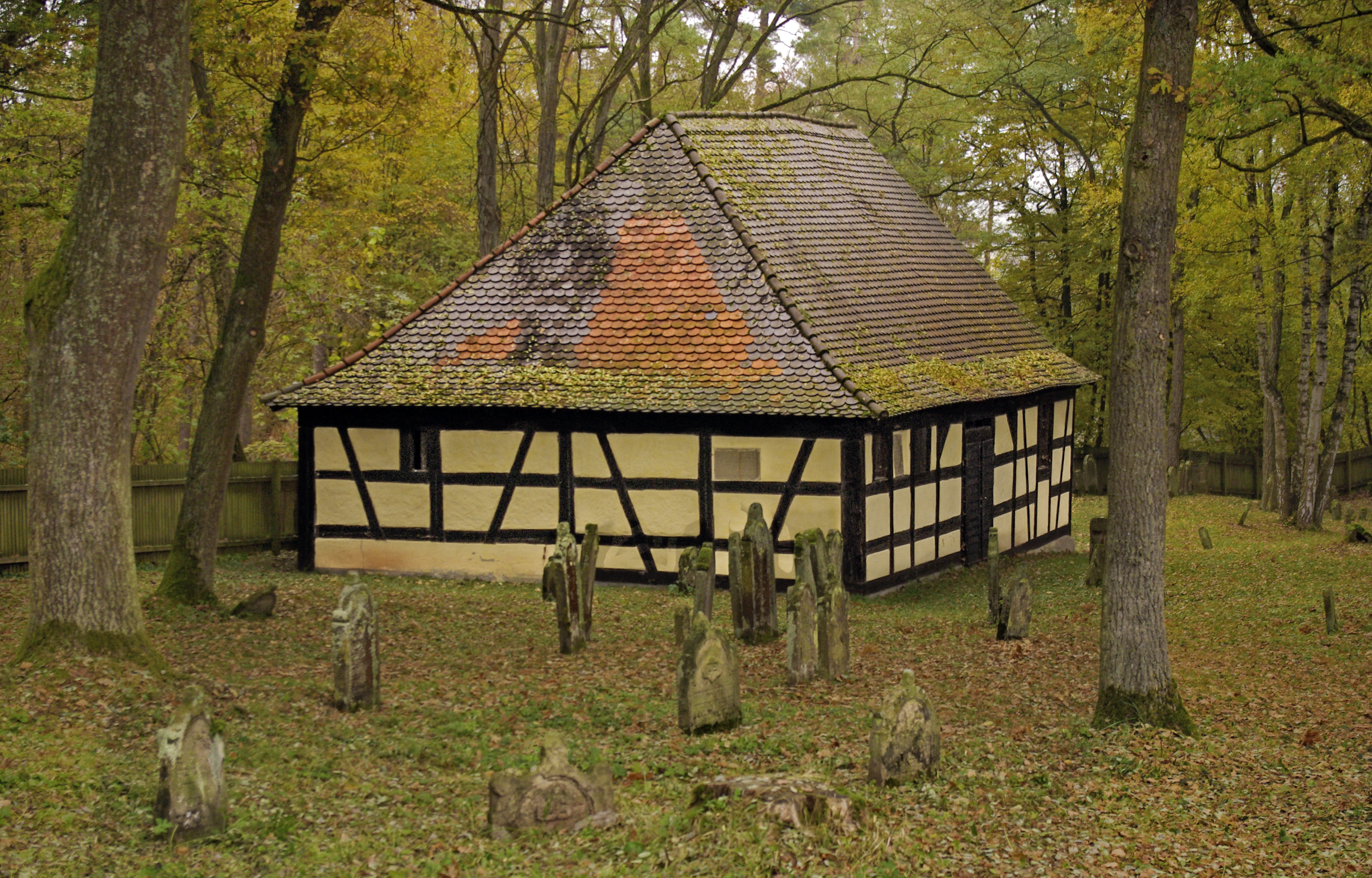 Jüdischer Friedhof in Walsdorf (Oberfranken), Taharahaus